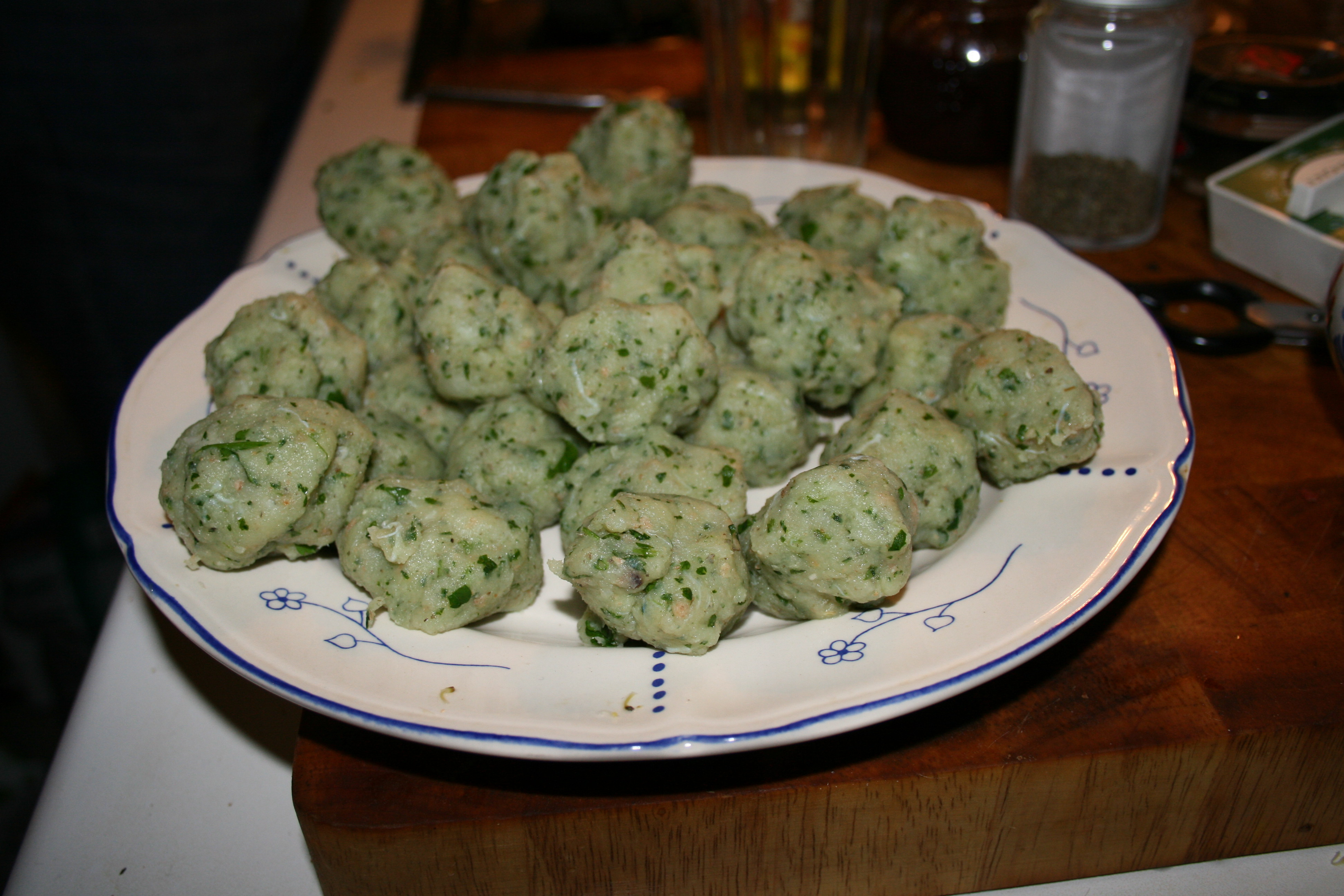 Albóndigas de Pescado con Salsa de Limón y Huevo